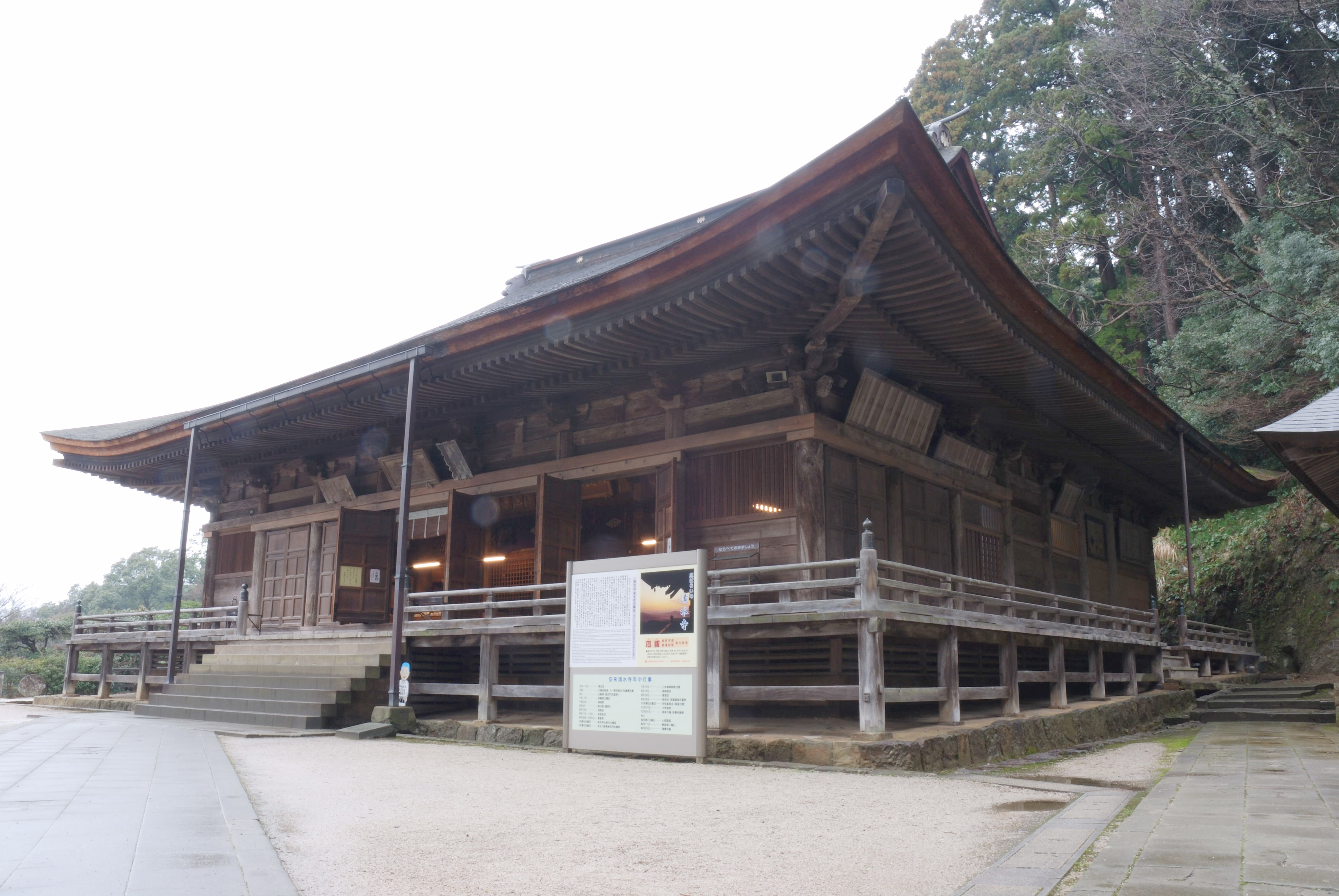 Kiyomizu-dera konpondo